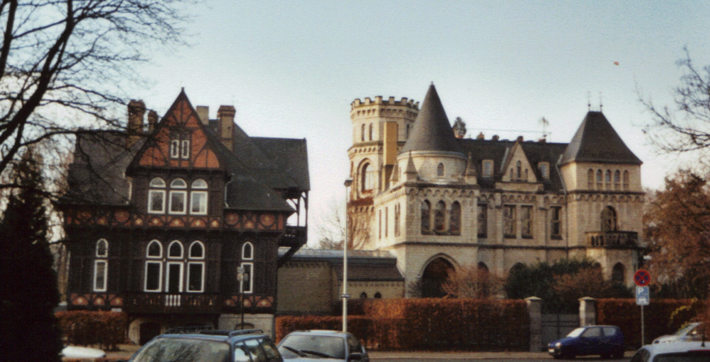 Villen am Weinberg in Hildesheim